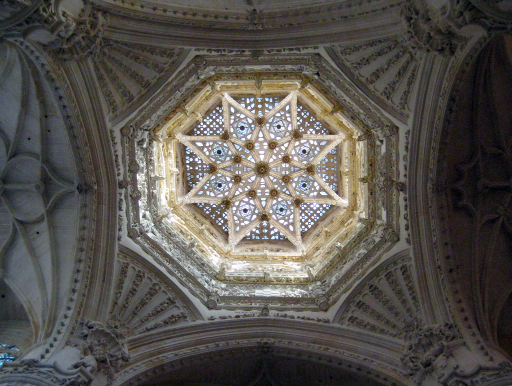 Kathedrale Burgos, Blick in die Vierung